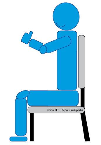 Position assise à adopter sur une chaise pour éviter les escarres